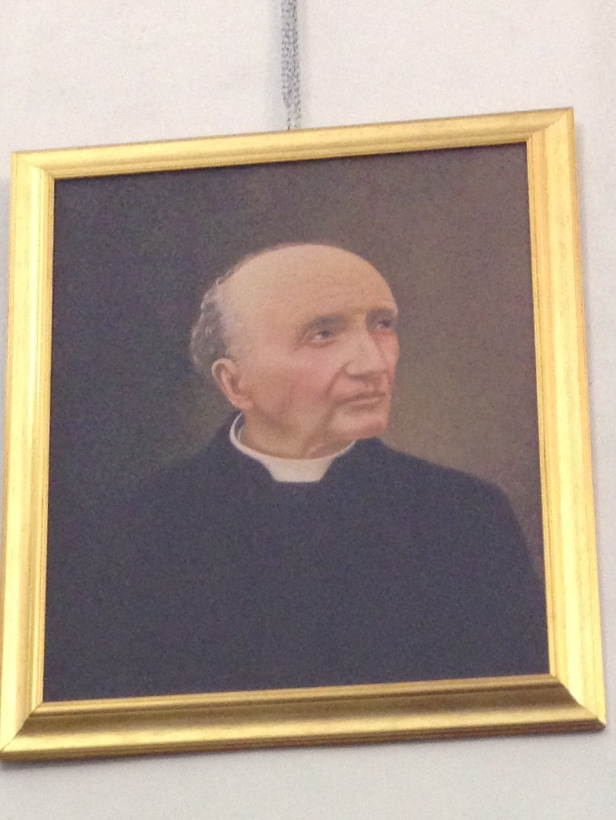 Ritratto di Pietro Bonilli conservato nel Santuario della Madonna di Loreto. (Spoleto)